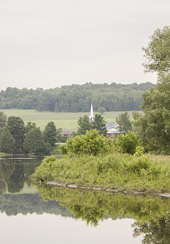 Martinville, Cantons-de-l'Est, Québec.